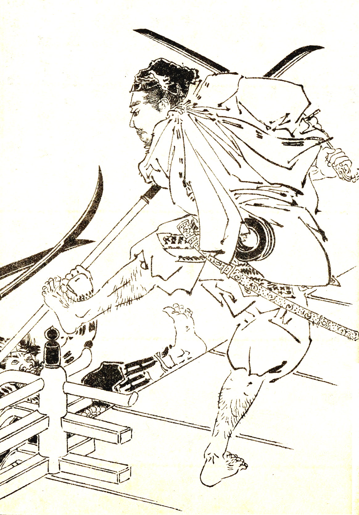 激闘する長谷部信連 『前賢故実』より.